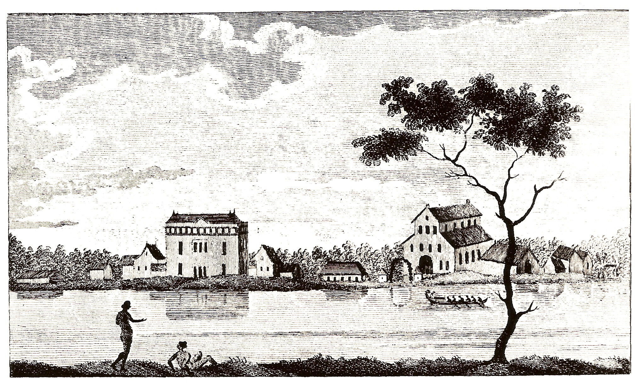 Plantage Alkmaar in Suriname. Eigen scan van 18de-eeuwse gravure, beschikbaar voor publiek domein.